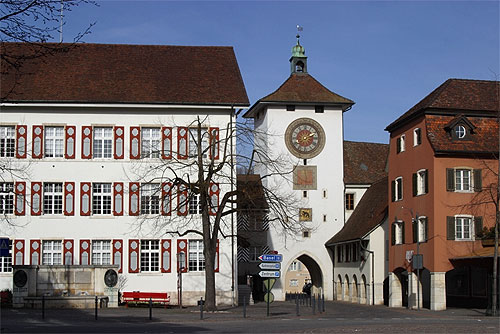 Laufen: Stadthaus und Obertor mit Zeitturm (15.–17. Jh.)